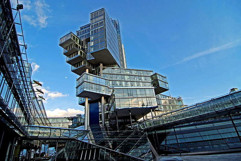 Hauptgebäude Norddeutsche Landesbank, Hannover